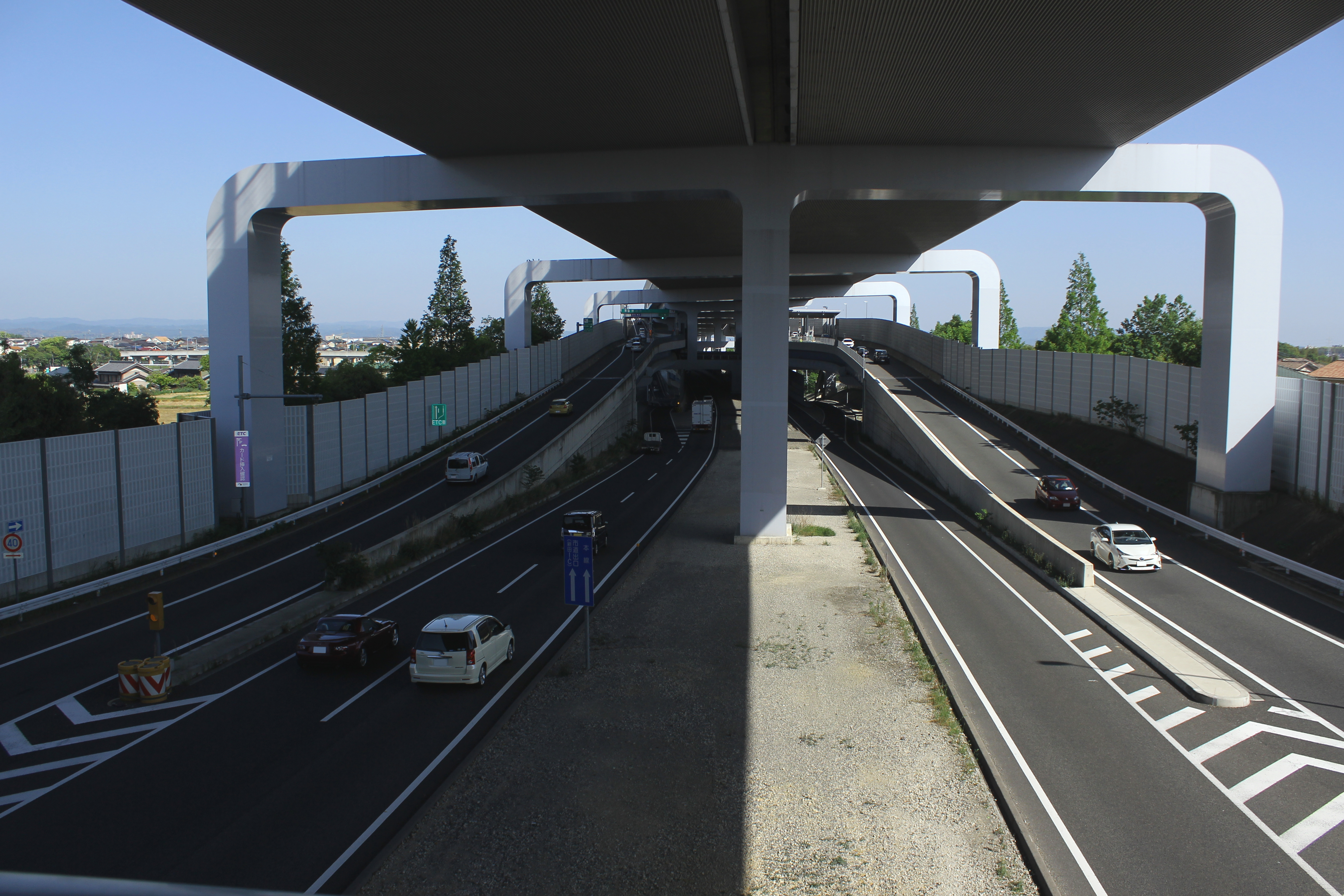 E1A伊勢湾岸自動車道 豊田南インターチェンジ